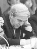 Berlin, D. Granin ADN-ZB Senft 18.12.81 Berlin: An der "Berliner Begegnung zur Friedensförderung" von Schriftstellern, Künstlern und Wissenschaftlern aus europäischen Ländern vom 13. bis 14. Dezember 1982 nahmen Dr. Günter Grass, Jurek Becker, Grigorij Baklanow und Daniil Granin teil. Abgebildete Personen: Granin, Daniil Alexandrowitsch: Schriftsteller, Sowjetunion (GND 121371328)